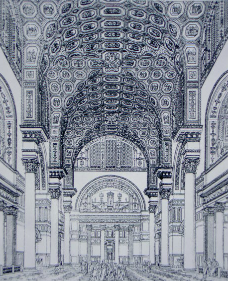 Bildbeschreibung: Innenraum der Caracalla-Thermen (Tepidarium), aus: F.A. Genzmer: Bade- und Schwimm-Anstalten, Stuttgart 1899 Quelle: URL Fotograf/Zeichner: Abel Blouet Datum: 1899